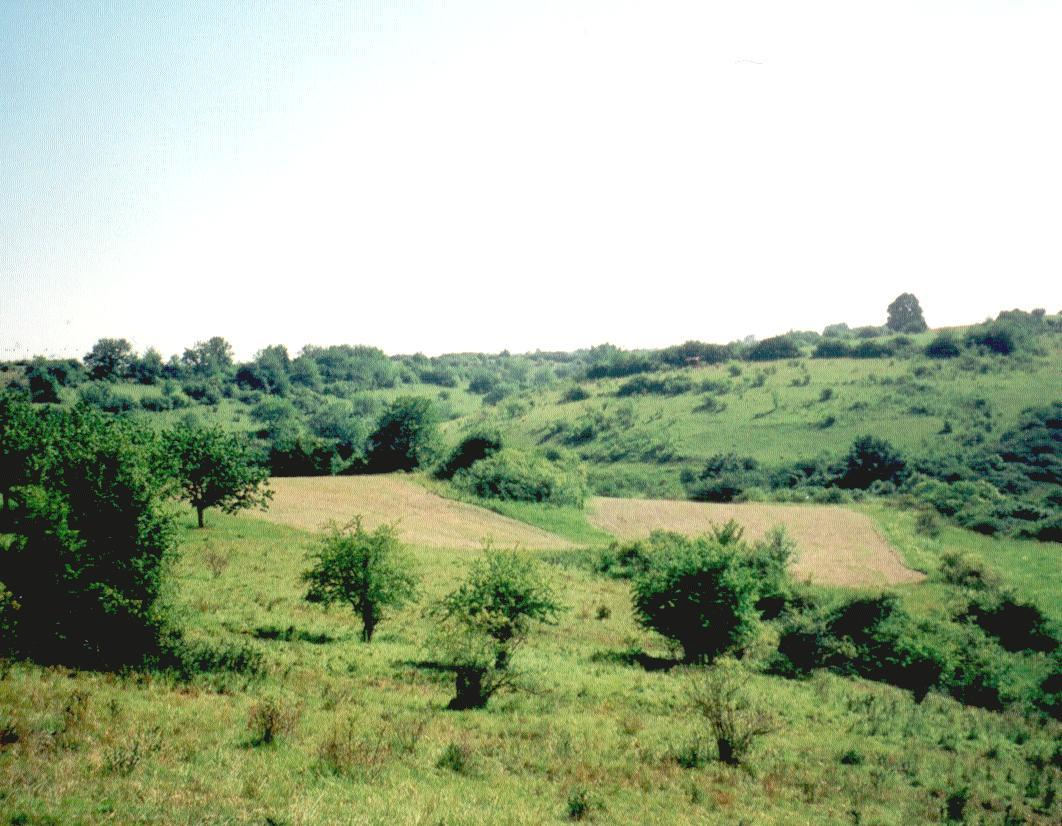 Strukturreiche Kalkmagerrasen im Flachstal bei Kaisershagen.